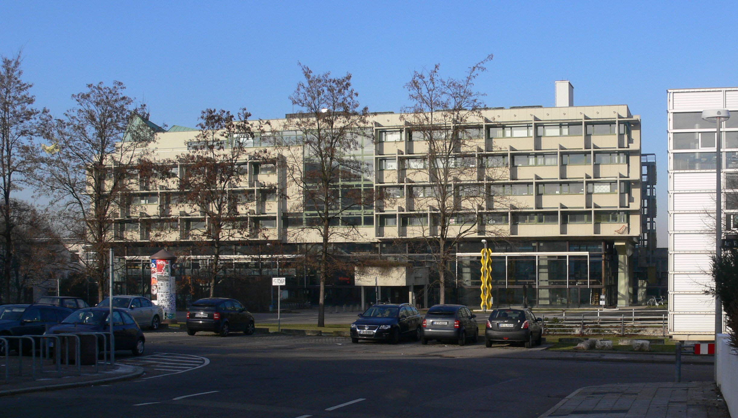 Staatliche Akademie der Bildenden Künste Stuttgart, Neubau 1 (Gebäude E), Am Weißenhof. Rechts: Neubau 2 (Gebäude F).